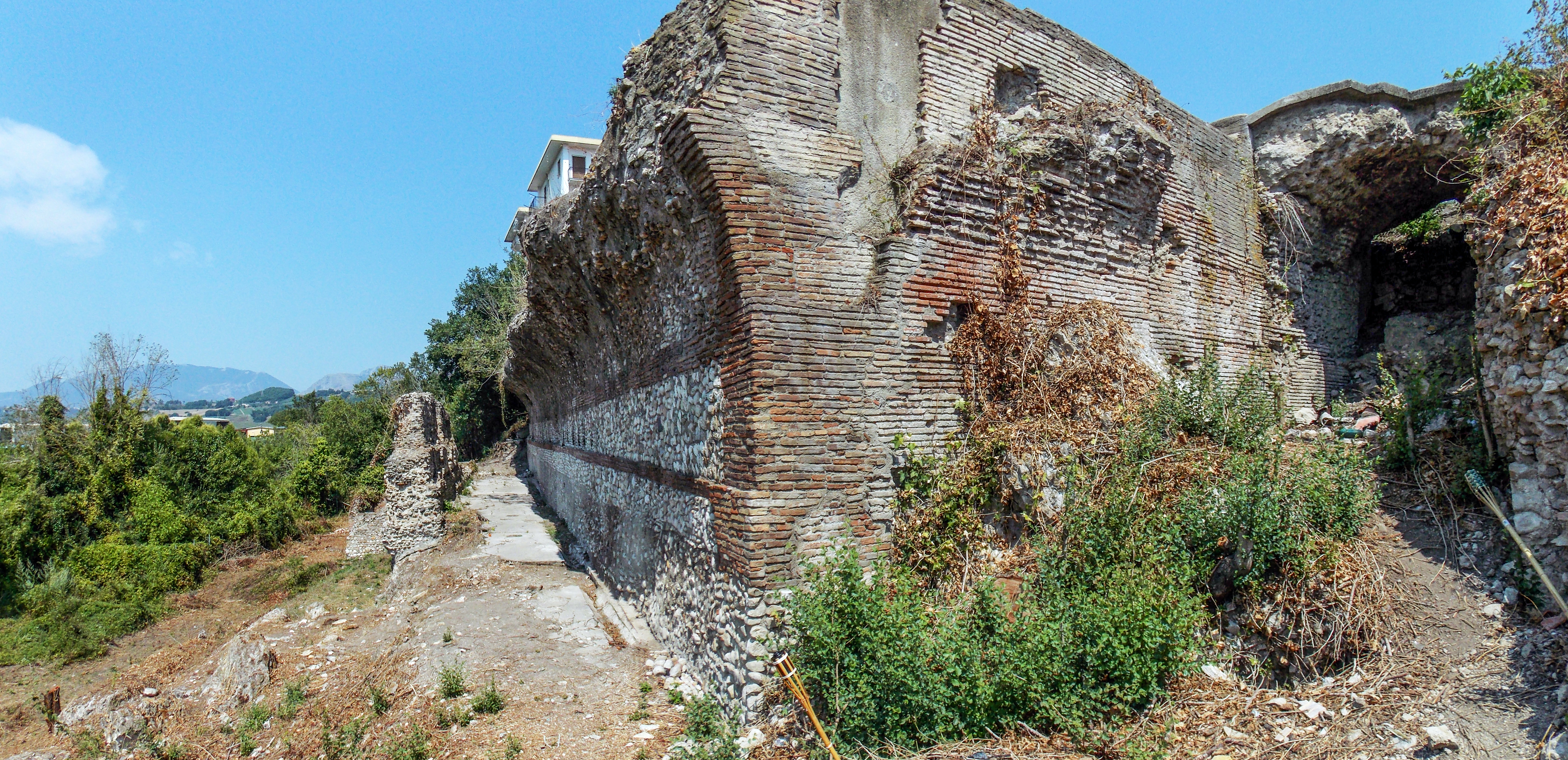 Criptoportico dei Santi Quaranta a Benevento. Vista dell'incrocio fra il corridoio longitudinale ed il corridoio trasversale intermedio